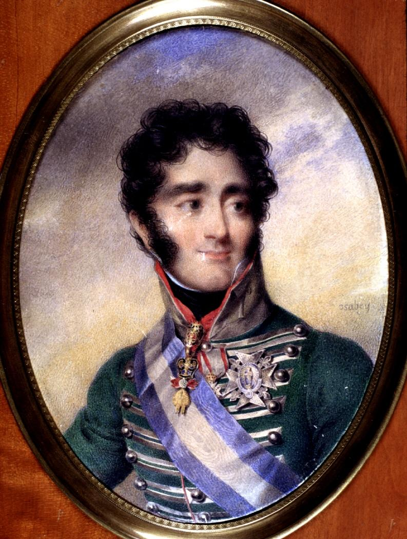 Retrato de busto mirando hacia la derecha sobre fondo nuboso. Viste casaca verde con entorchados de plata. Condecoraciones: banda y cruz de la Orden de Carlos III y el Toisón. Delicado puntillismo a la hora de aplicar el color, disponiendo las diminutas líneas con su característico trazado de arriba abajo. Dibujo realizado con lápiz negro claramente visible, sobre todo en los cabellos,. En los ojos, en las vestiduras y los adornos que las complementan. (ESPINOSA MARTÍN, M. Carmen.